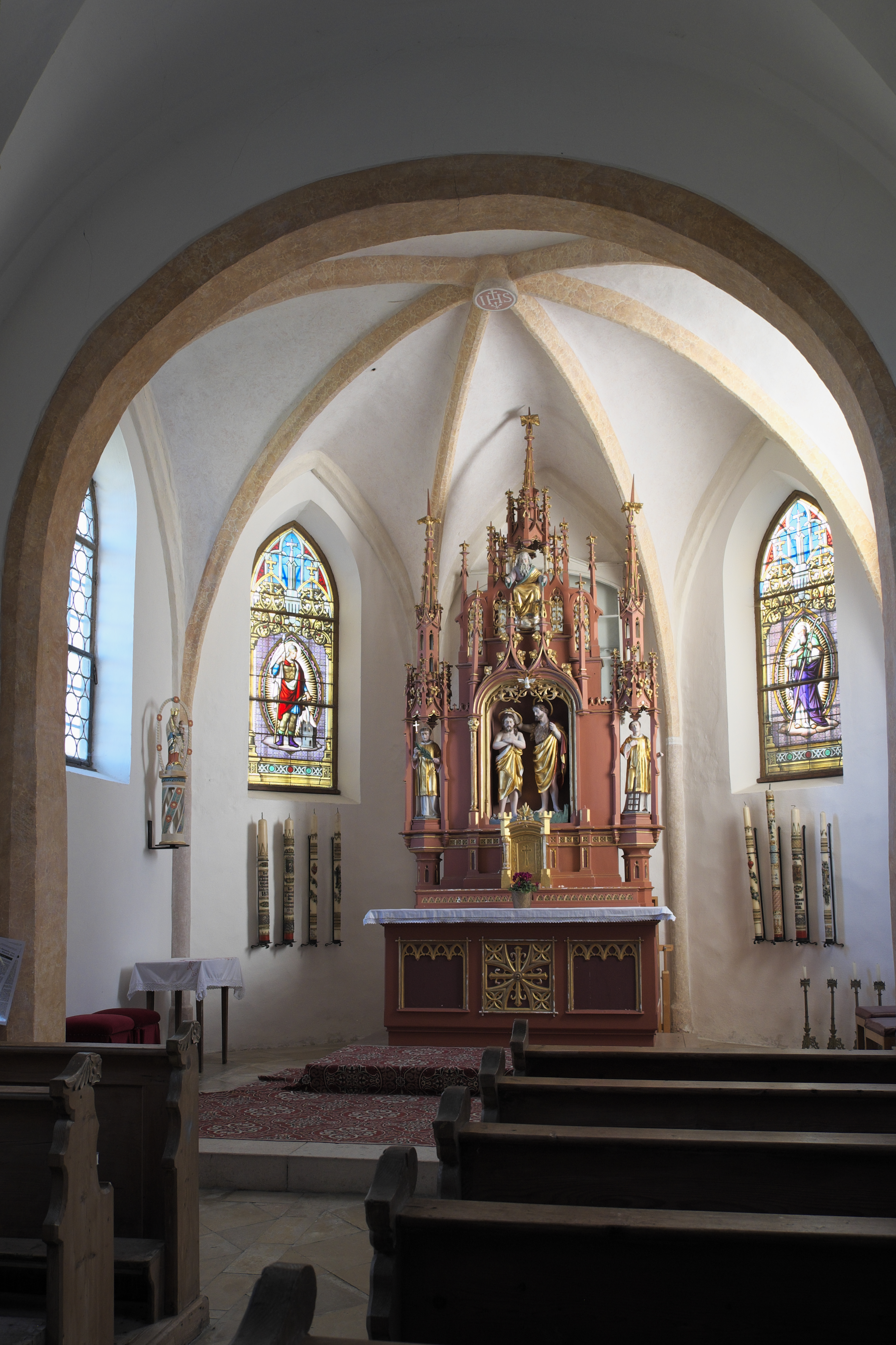 Katholische Filialkirche St. Johannes der Täufer in Sankt Johann (Siegsdorf) im Landkreis Traunstein (Bayern/Deutschland), Innenraum